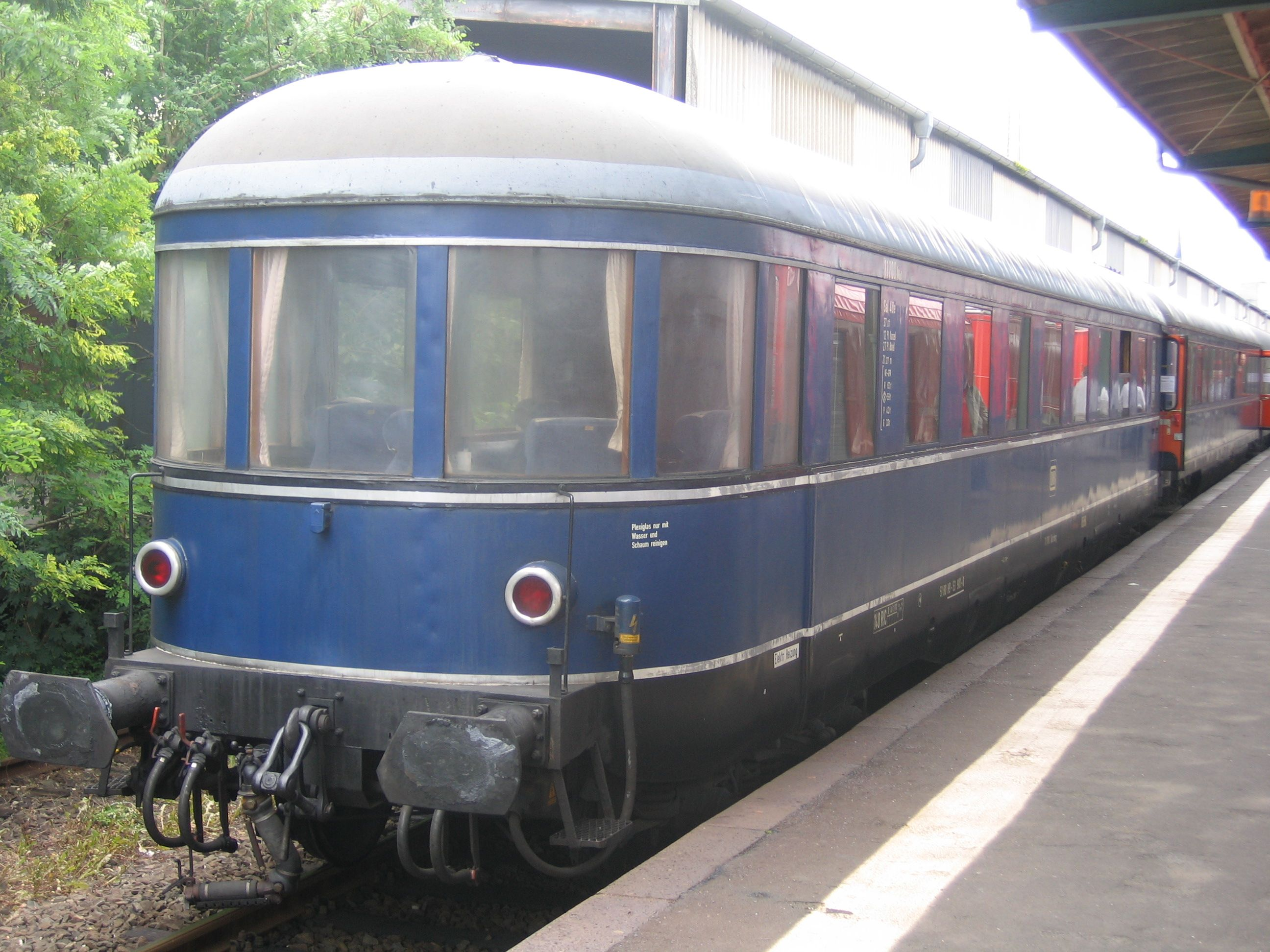 Gegenzug Endwagen (Return train trailer car, similar to Henschel-Wegmann)